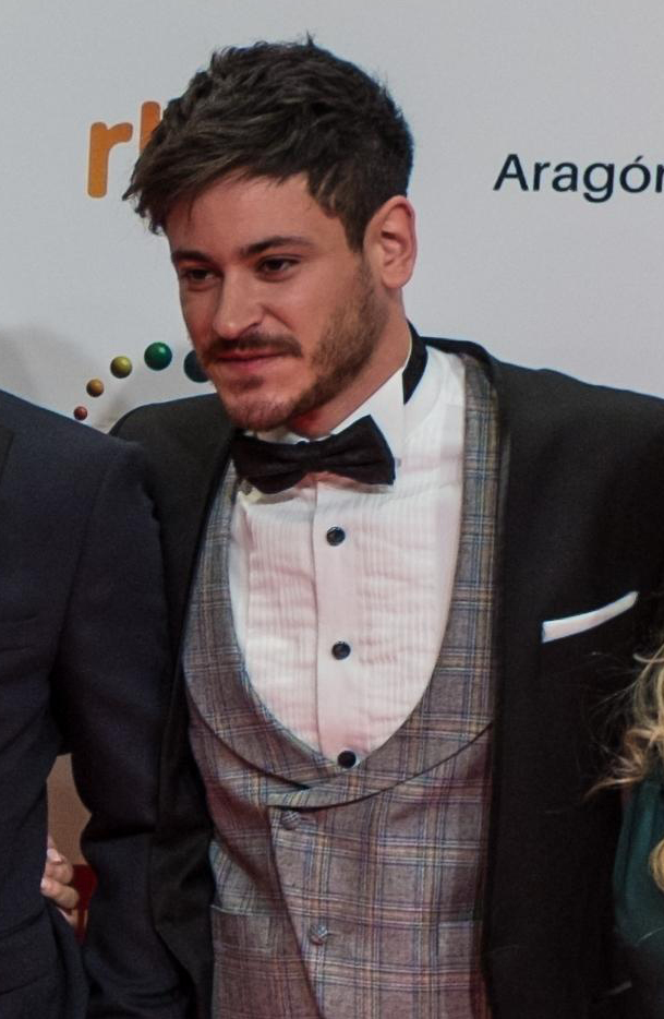 Cepeda